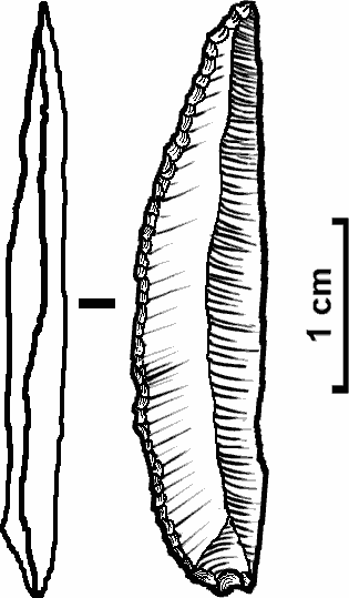 Hojita Dufour - tipo no real